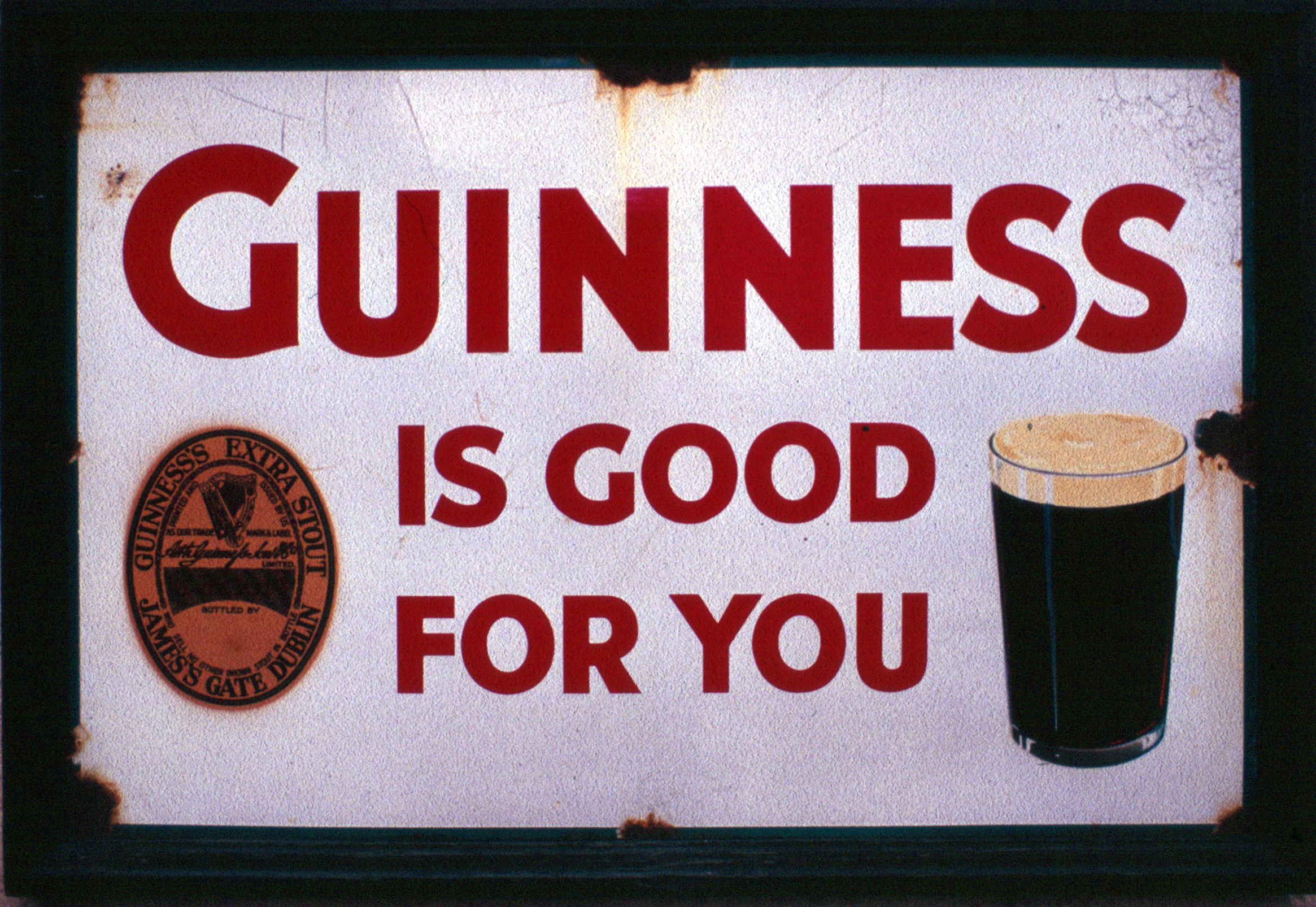 Bunratty Castle & Folk Park